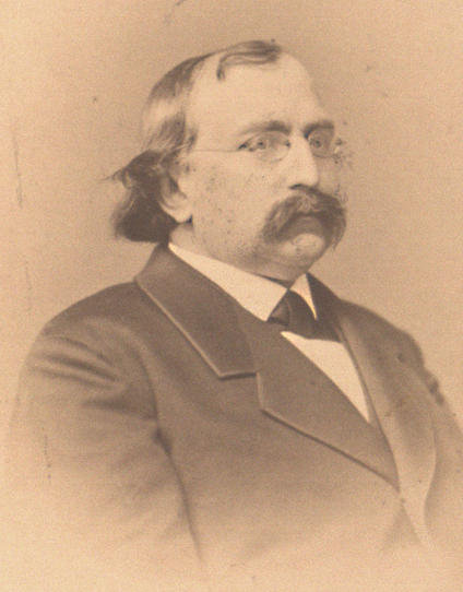 Stengel, Adolf (Hermann Theodor)